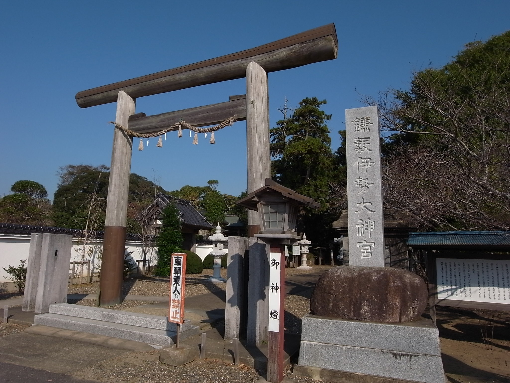 鎌数伊勢大神宮 （千葉県旭市）